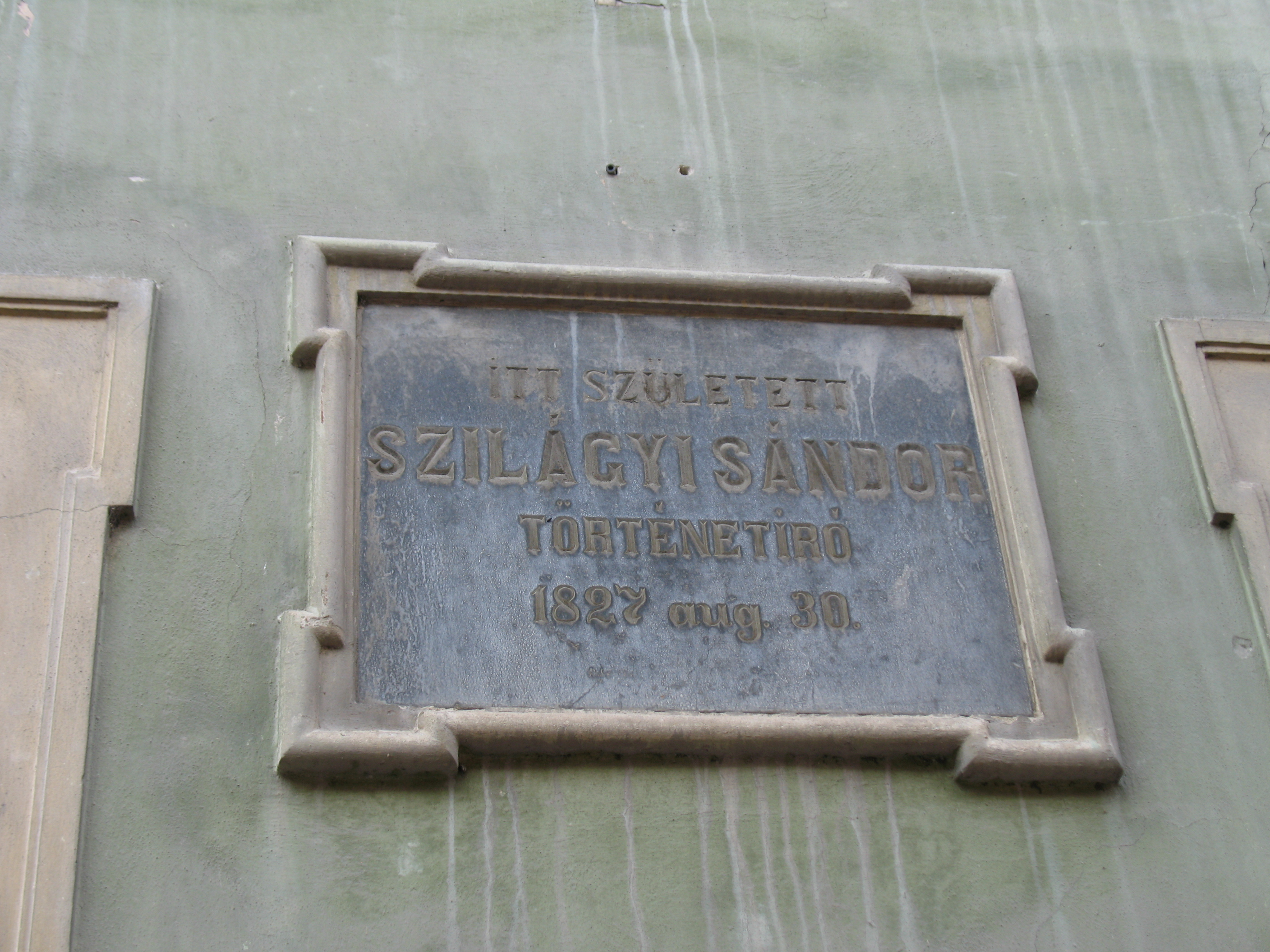 Kolozsvár